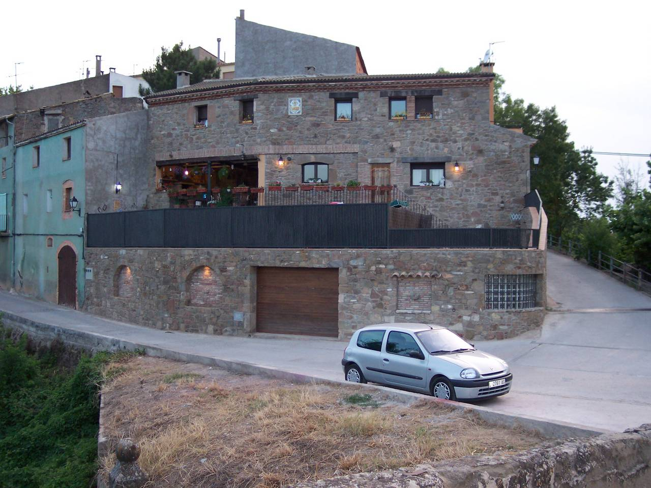 Ca na Núria in Torà (Catalunya-Spain)